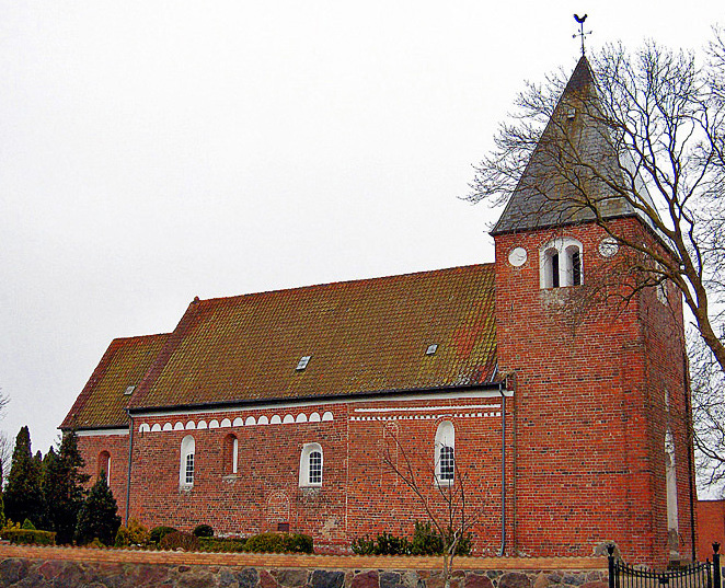 fra nordvest